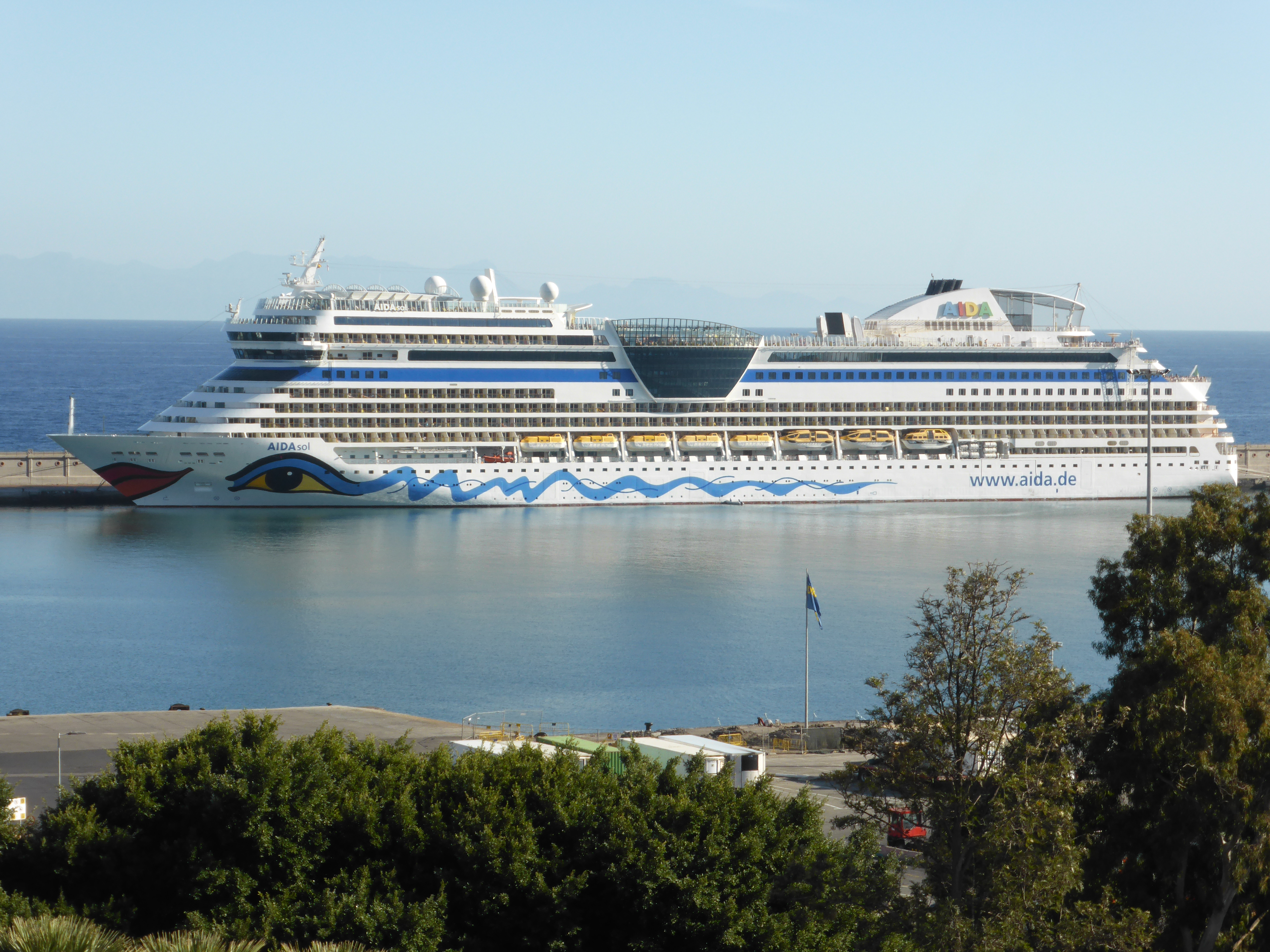 El crucero de pasajeros "AIDAsol" es un visitante habitual del puerto de Santa Cruz de Tenerife, alternándose con el crucero "AIDAblu". Ambos son de la serie "Sphinx", construidos por el astillero alemán "Meyer Werft GmbH". El "AIDAsol" fue terminado en 2011. Tiene capacidad para 2.176 pasajeros, y 611 tripulantes. Longitud: 253 metros de eslora. Su itinerario actual abarca los puertos principales de 5 islas distintas: 4 de Canarias (Lanzarote, Gran Canaria, Tenerife y La Palma) y uno de Madeira. El "AIDAsol" tiene pabellón italiano, aunque normalmente el idioma de a bordo es el alemán. IMO: 9490040